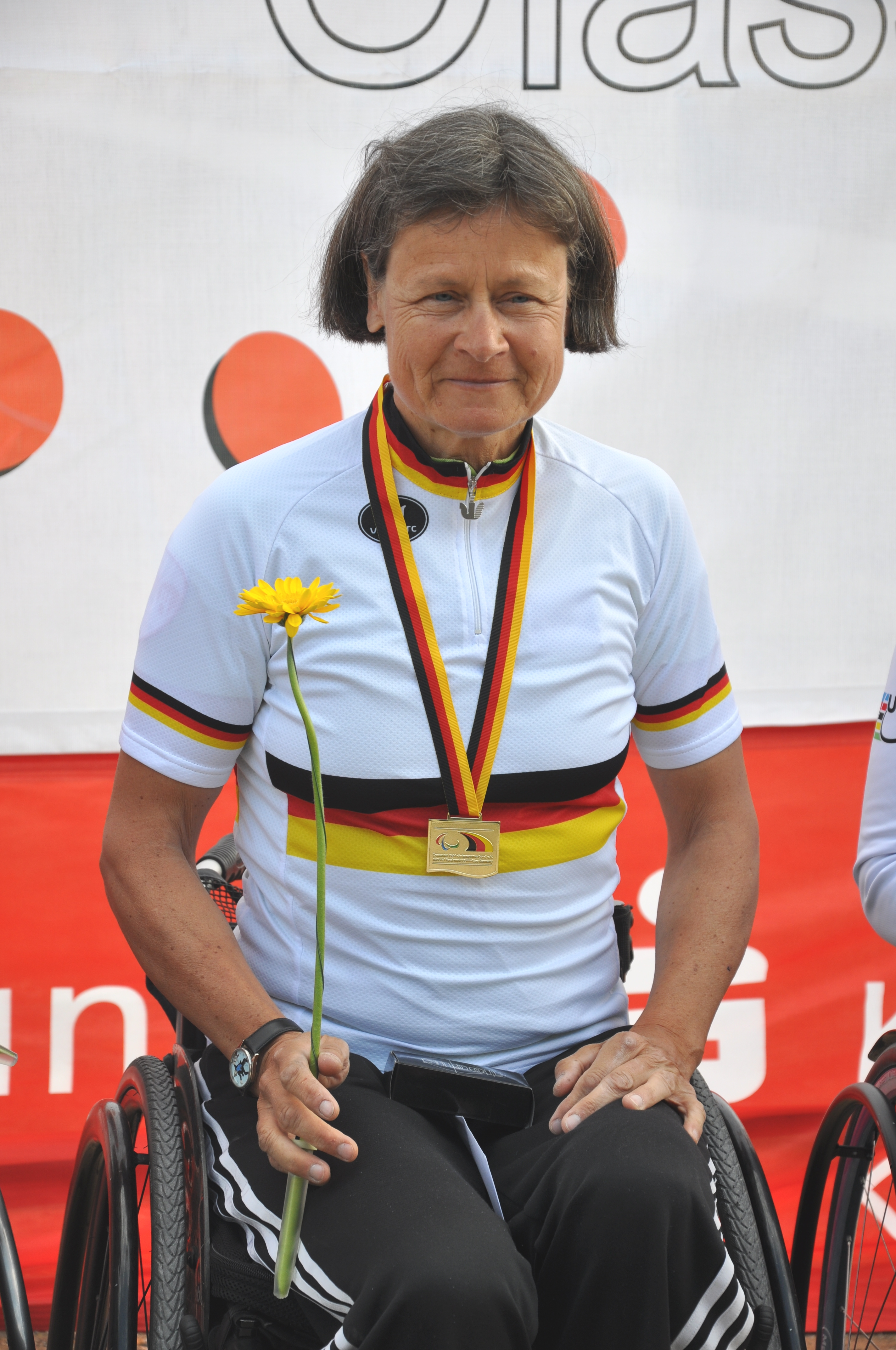 Dorothee Vieth, German para-cyclist